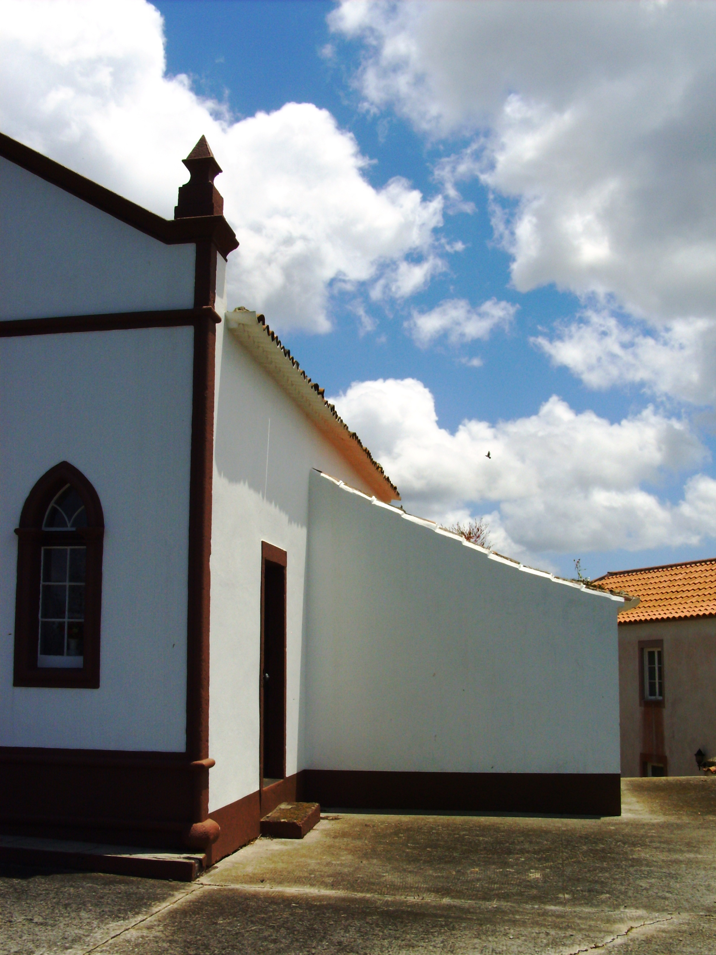 Ermida de Nossa Senhora da Graça, Ilha de Santa Maria (Açores), Portugal.